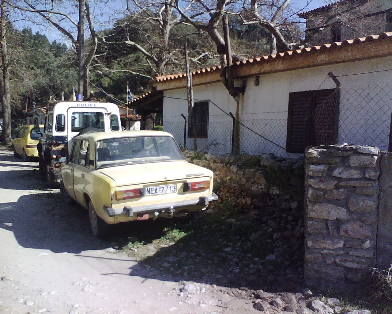 Frangokastro